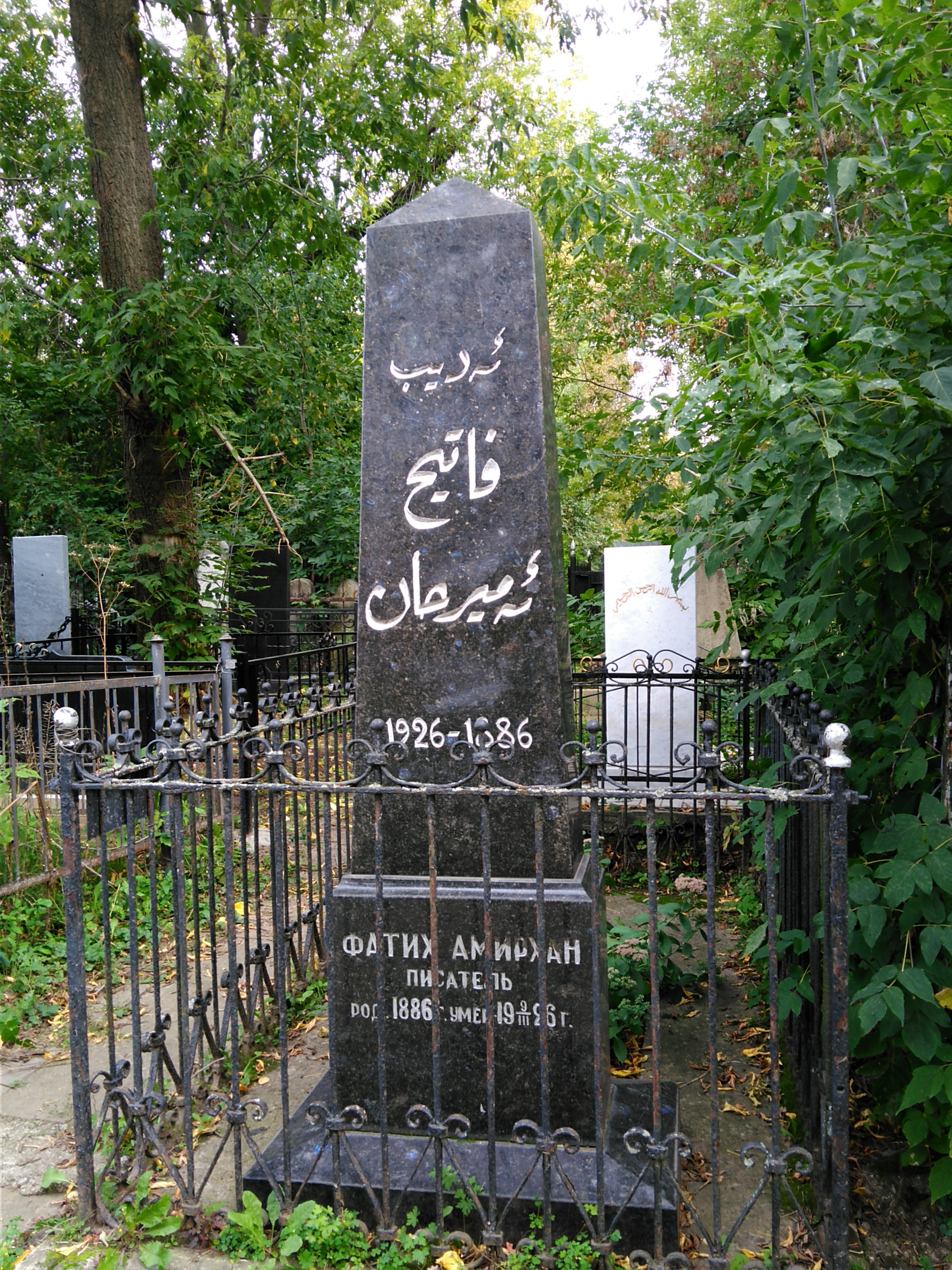 Могила Фатыха Амирханова, писателя: татарское кладбище, Казань, Татарстан